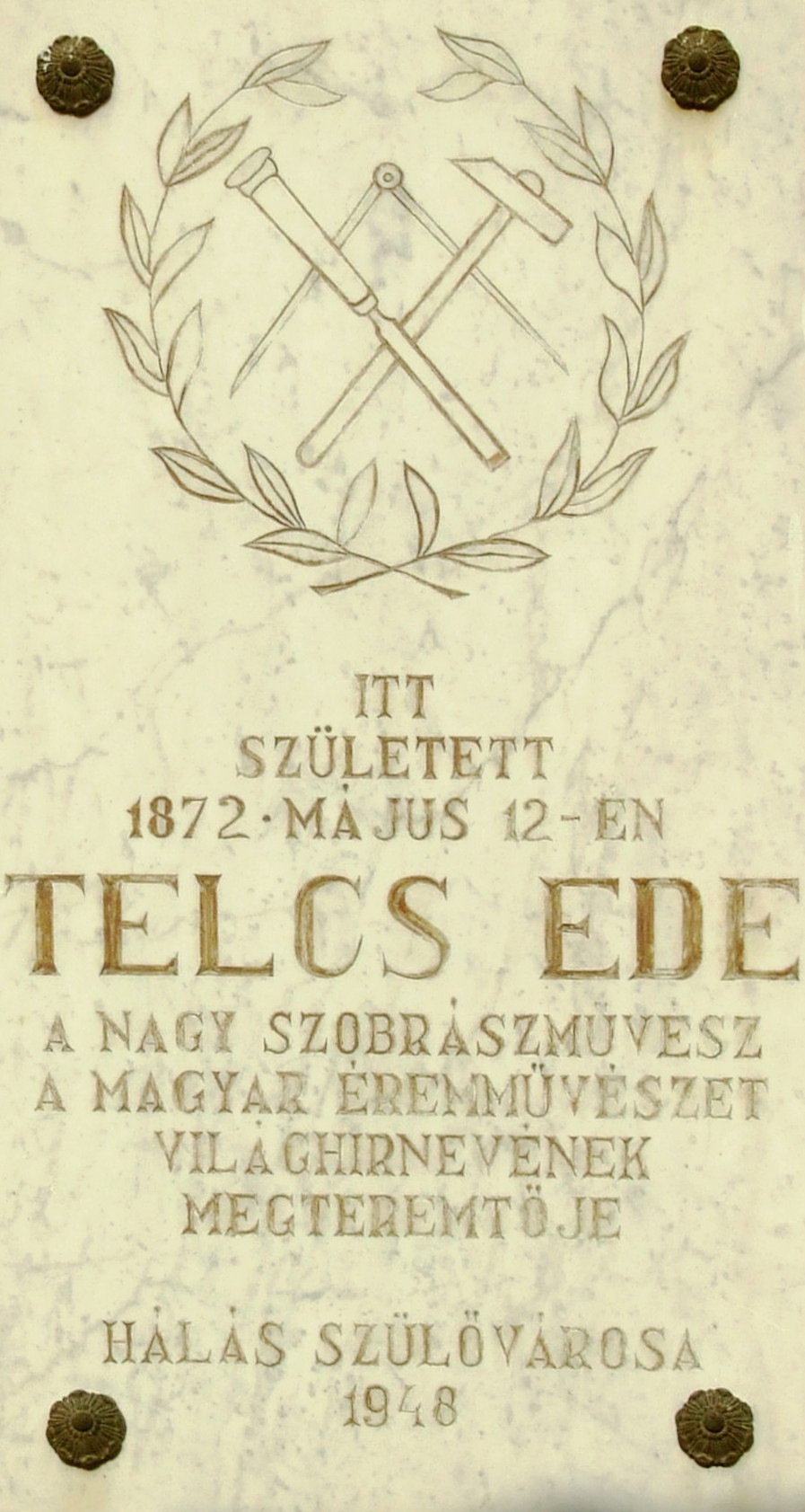 Emléktábla Telcs Ede szobrászművész bajai szülőházán. Telcs Ede utca 1.